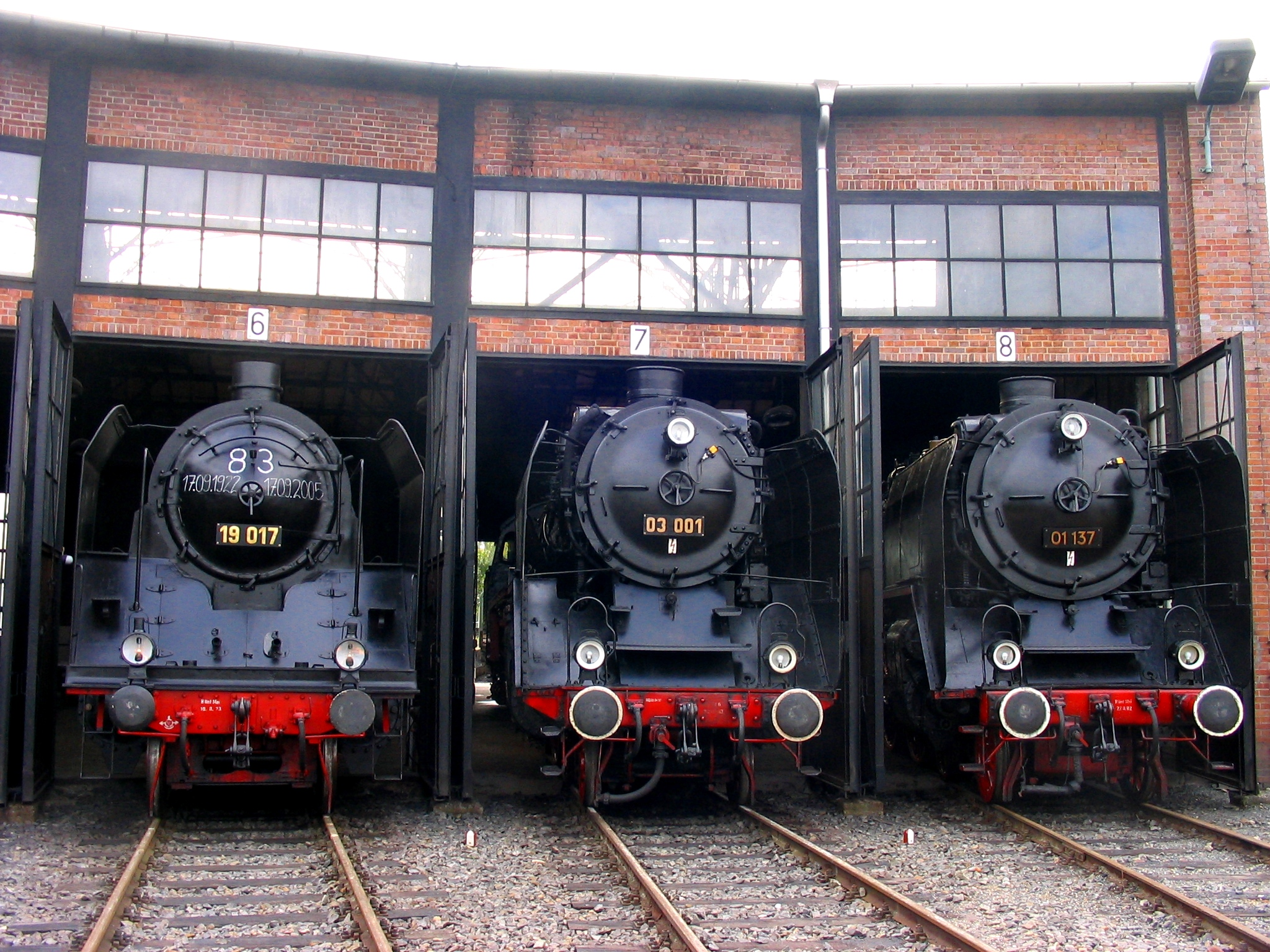 19 017, 03 001 und 01 137 im Lokschuppen des Eisenbahnmuseums Dresden-Altstadt